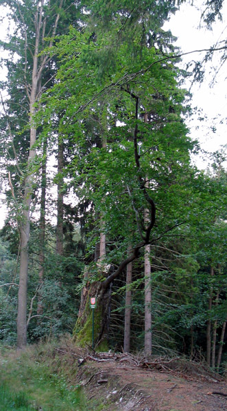 Torzo památného stromu Hejkal u samoty Melmatěj.